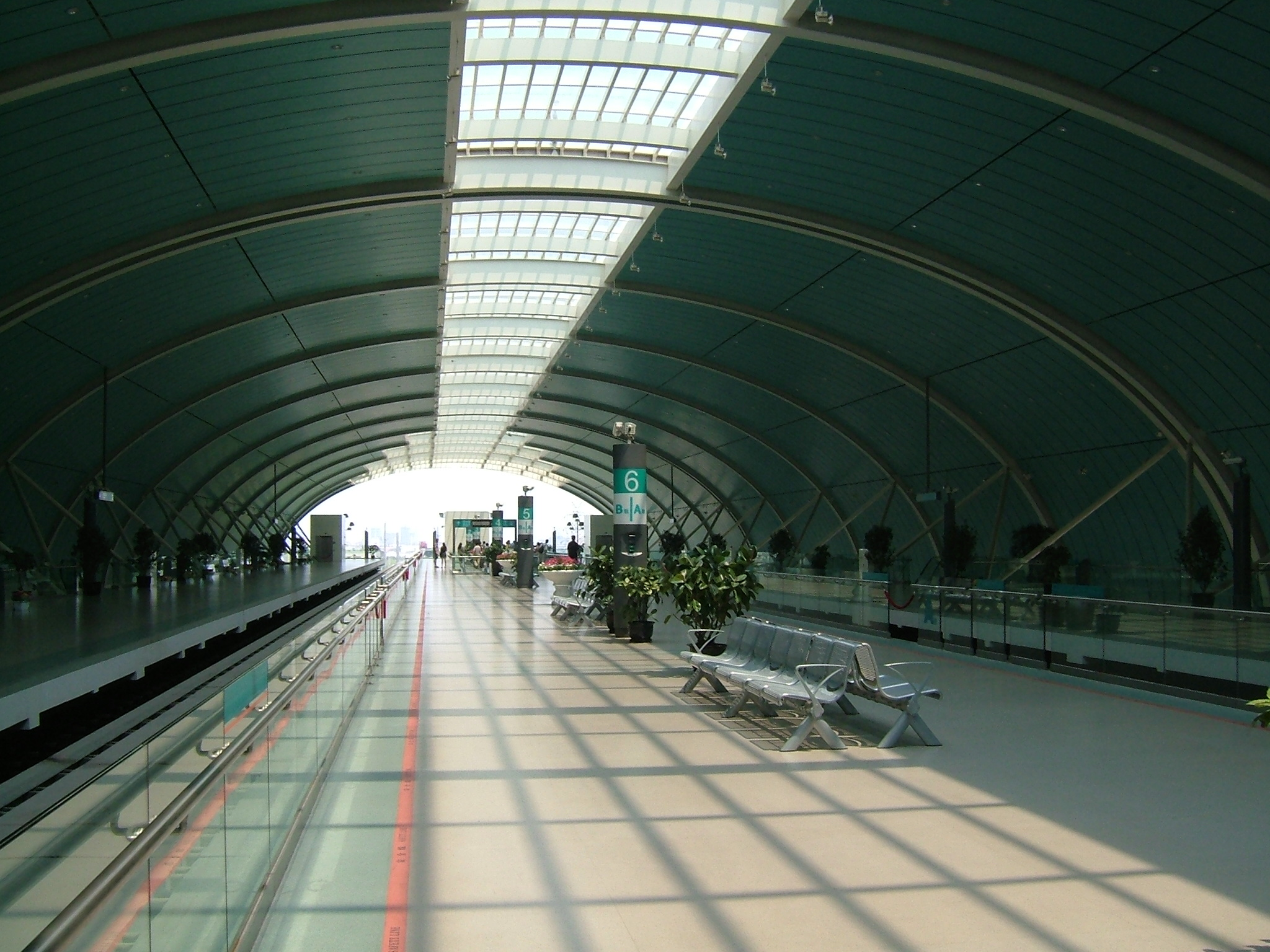 上海磁浮示范运营线龙阳路站。